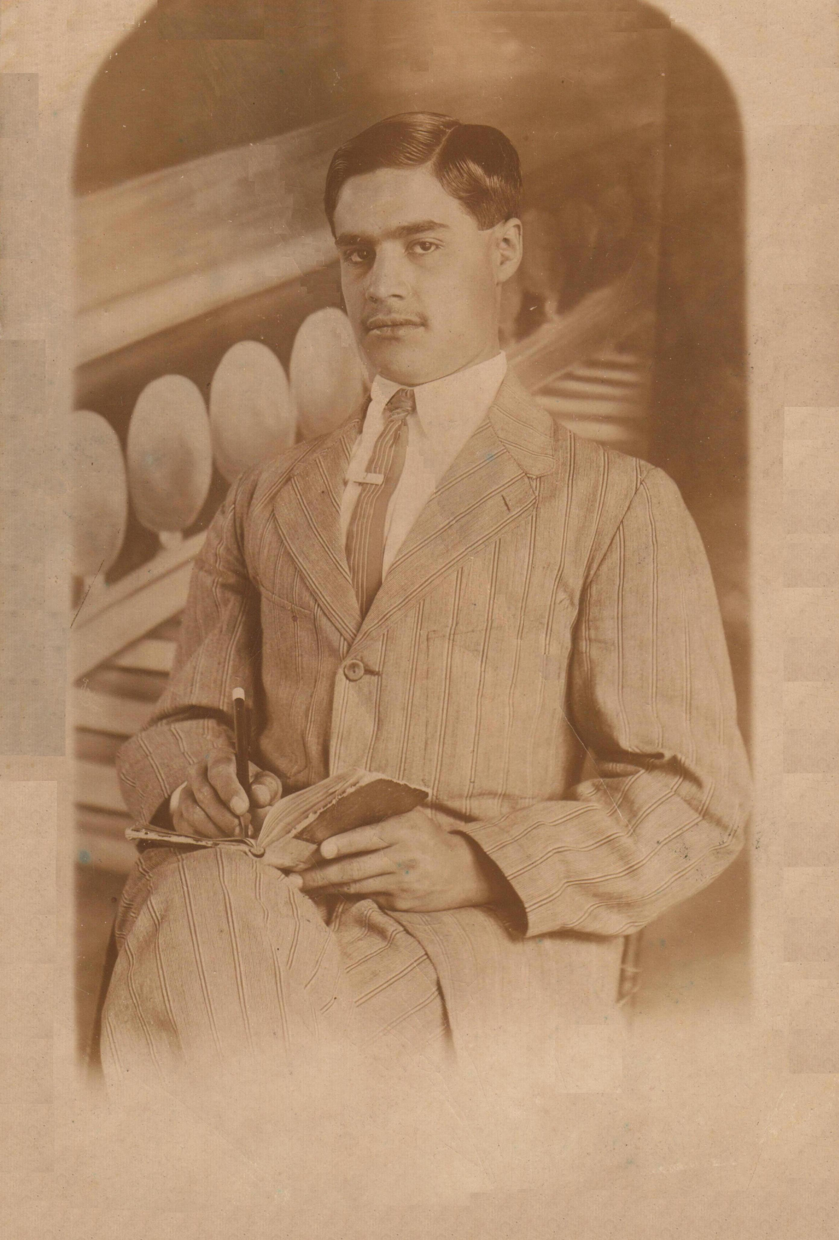 Foto de Jehová Roque Villa Michel